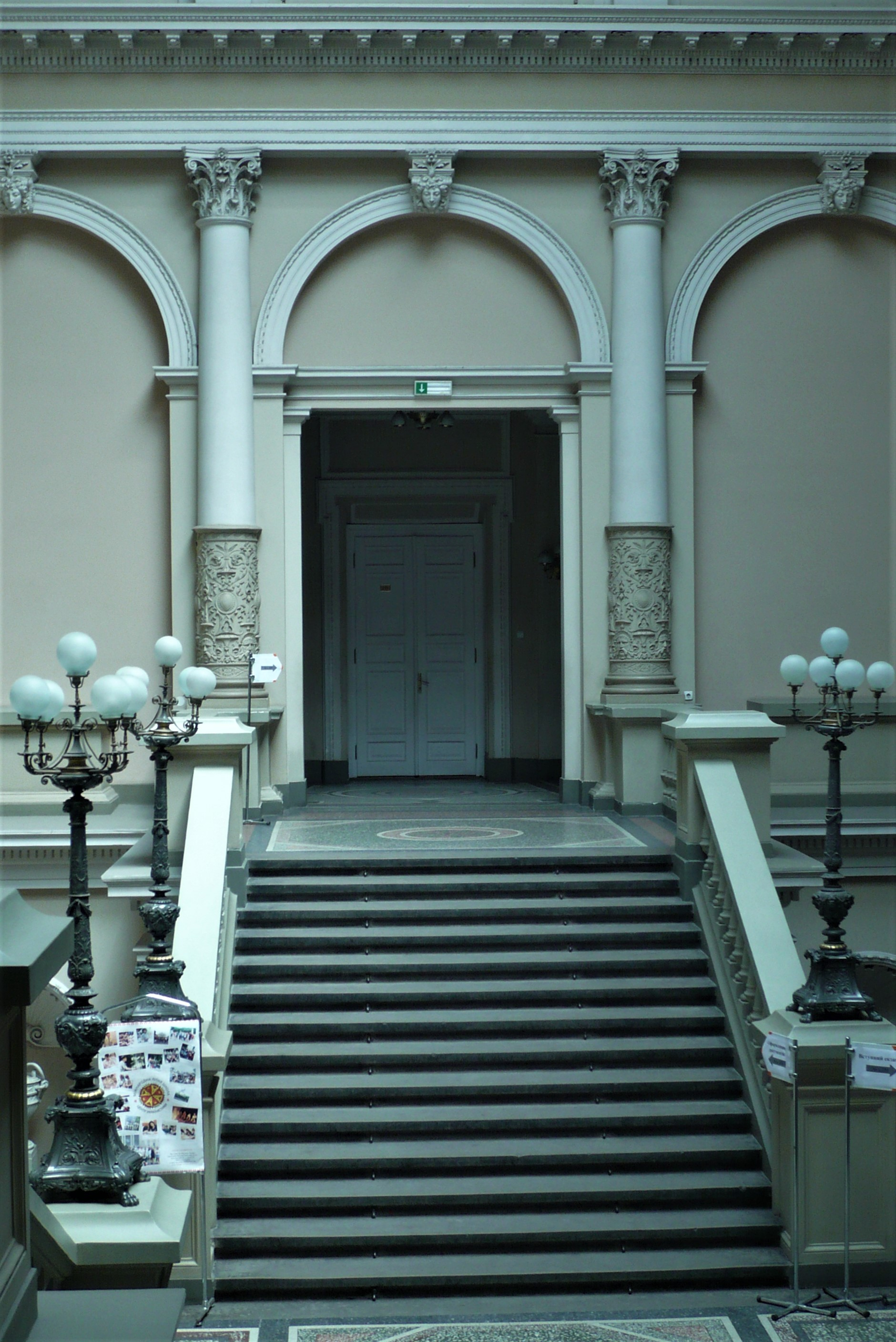 Lwowski Uniwersytet Narodowy im. Iwana Franki. Hol